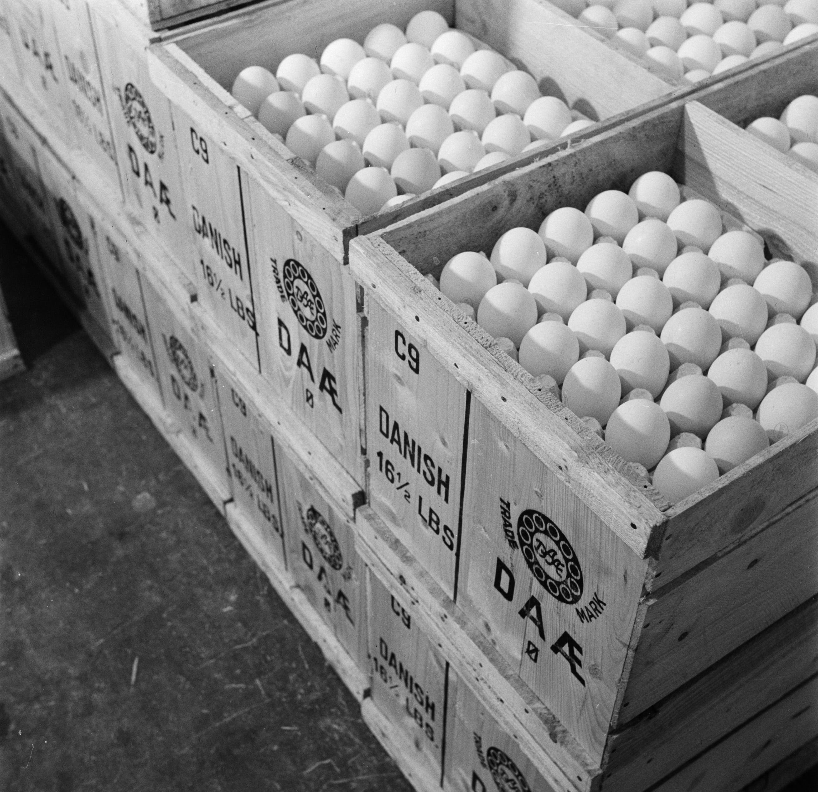 Collectie / Archief : Fotocollectie Van de Poll Reportage / Serie : Eier exportbedrijf D.A.Æ Beschrijving : Stapels kratten gevuld met eieren Datum : maart 1954 Locatie : Denemarken Trefwoorden : eieren, emballage Fotograaf : Poll, Willem van de, [onbekend] Auteursrechthebbende : Nationaal Archief Materiaalsoort : Negatief (zwart/wit) Nummer archiefinventaris : bekijk toegang 2.24.14.02 Bestanddeelnummer : 252-9085